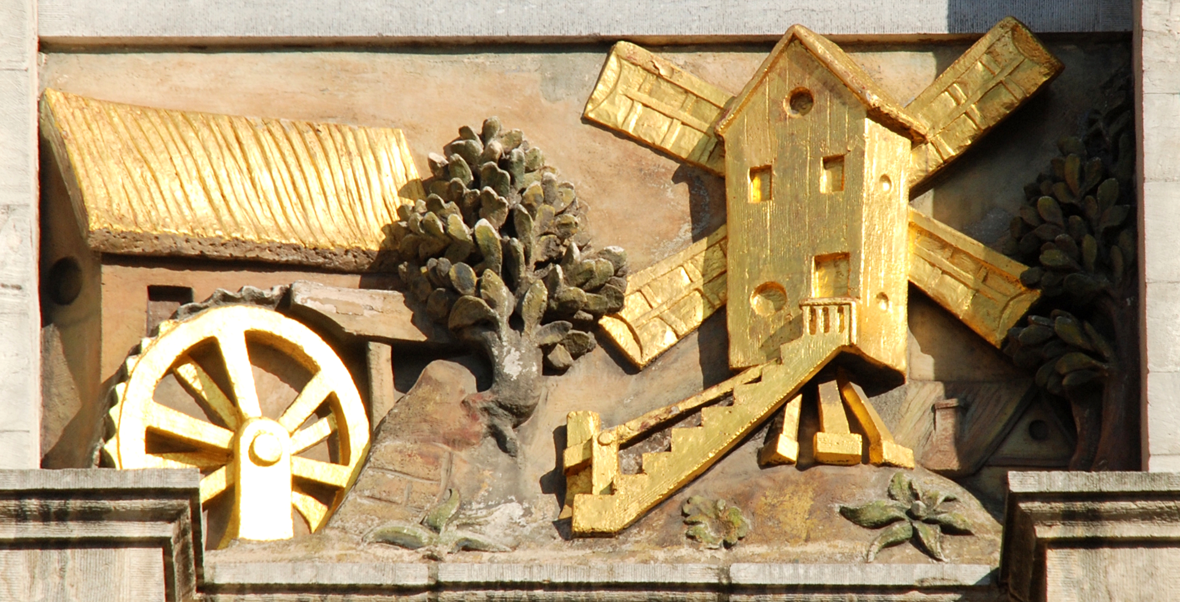 Belgique - Bruxelles - Maison du Moulin à vent